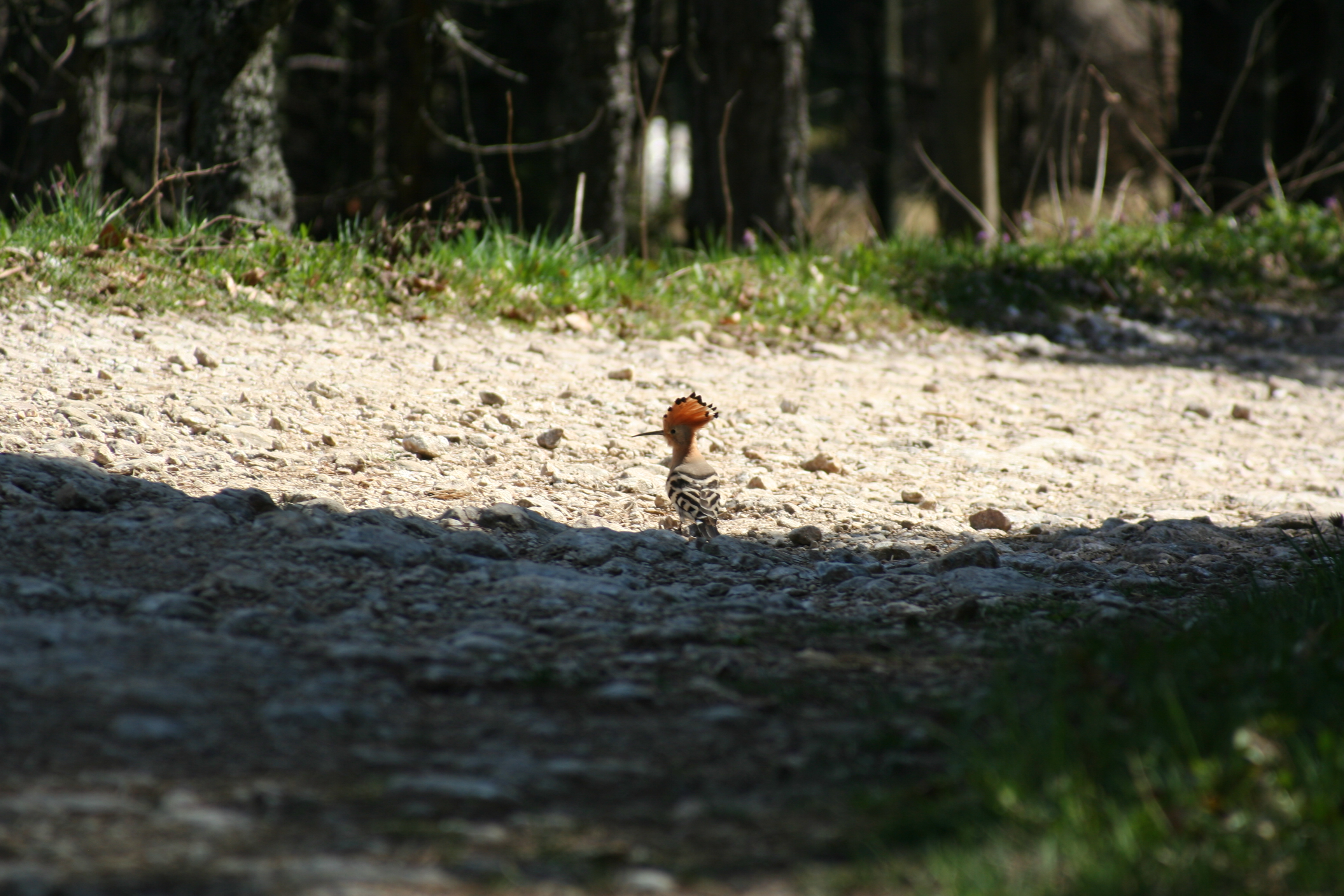 Ptica, Bobija